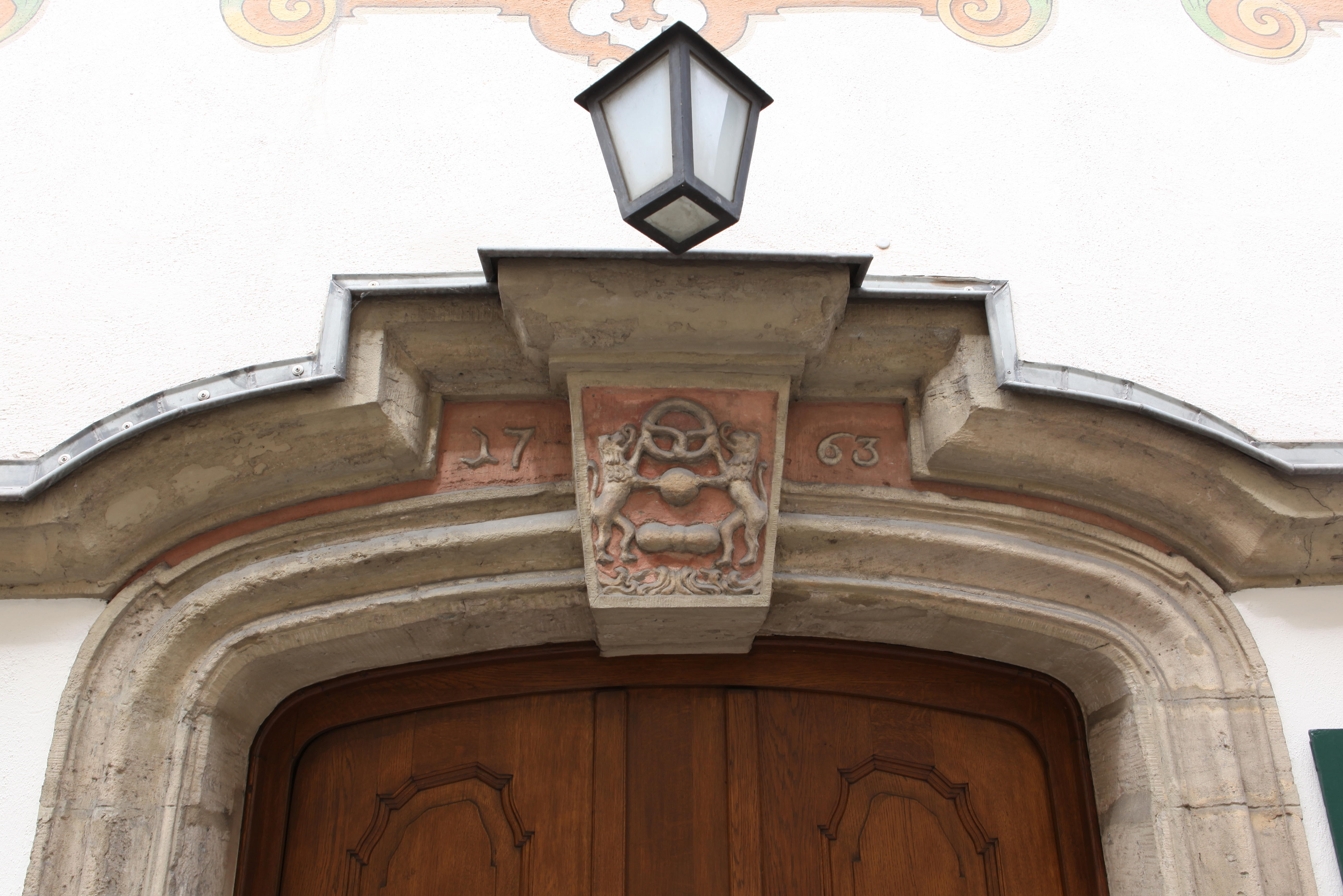 Portal der Loreley in der Rückertstraße, Coburg